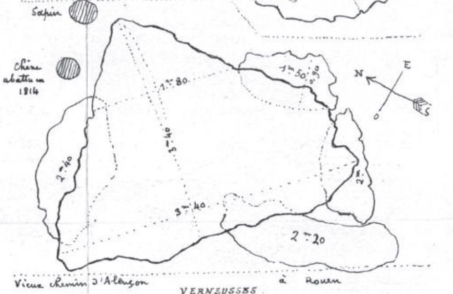 Vue en plan du dolmen des Verneusses dans l'Eure dessiné par Léon Coutil en 1897 avant l'opération de redressement